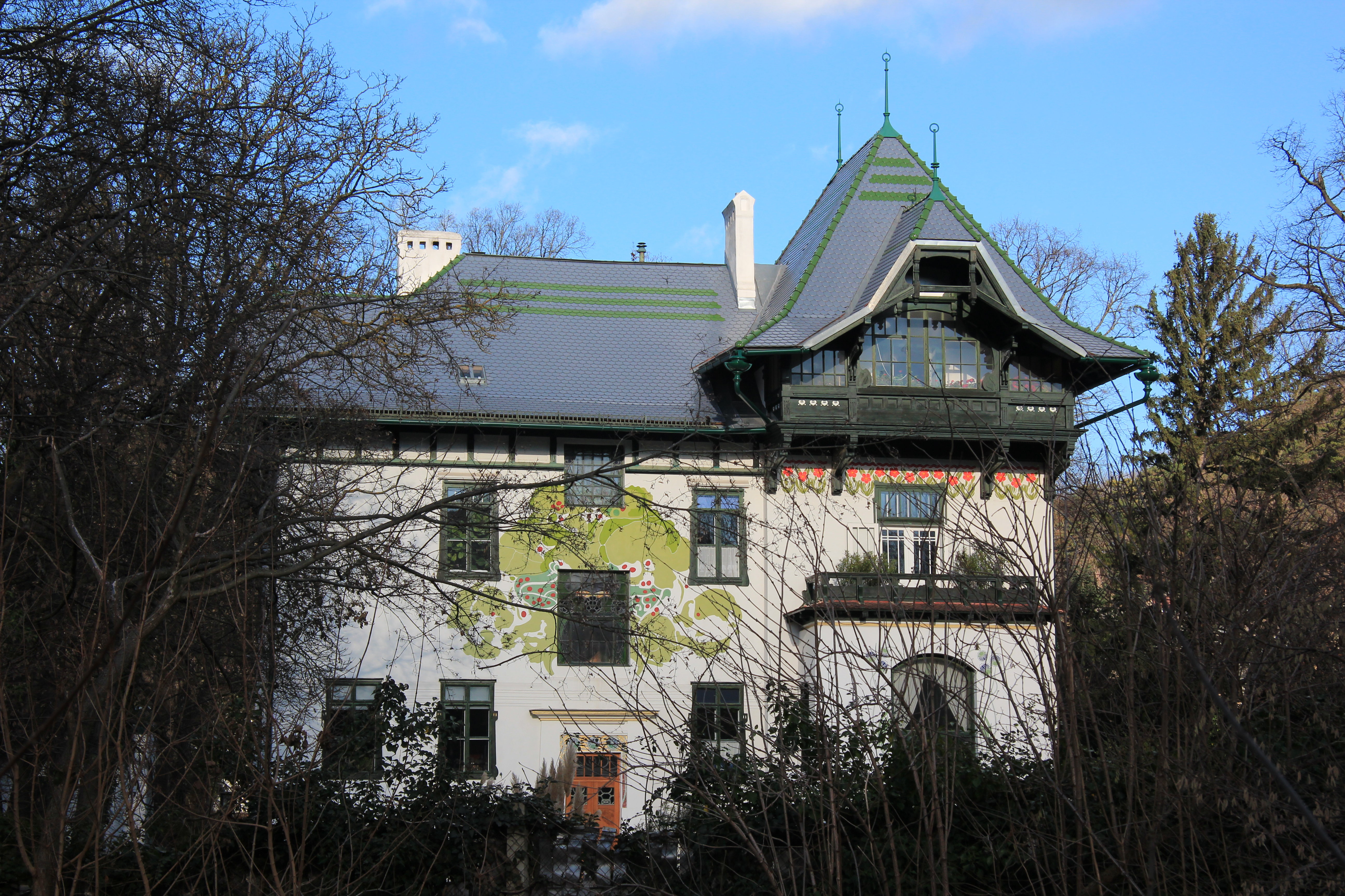 Villa Friedmann, in der HInterbrühl, NIederösterreich